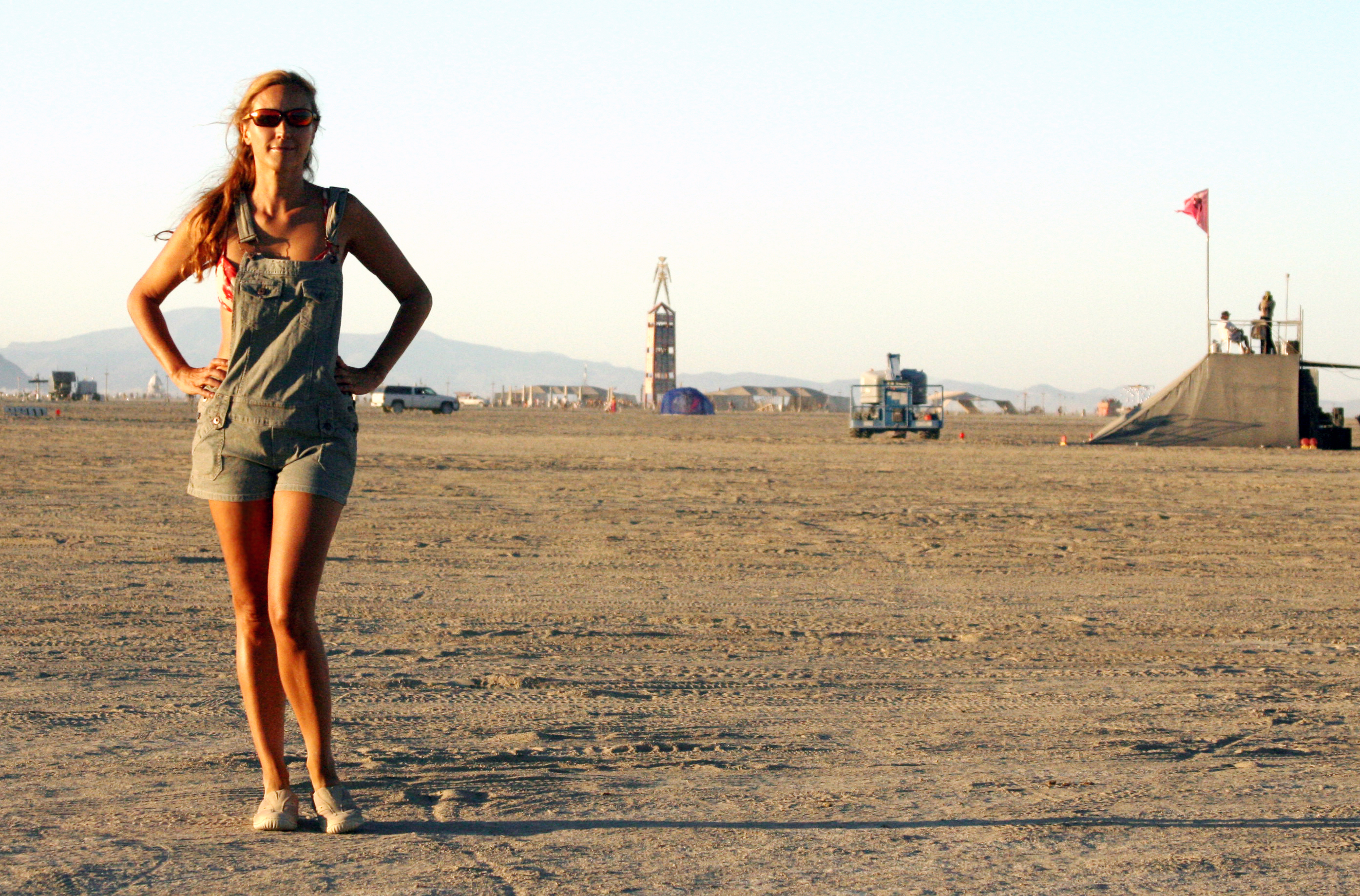 Regia Elena Somarè